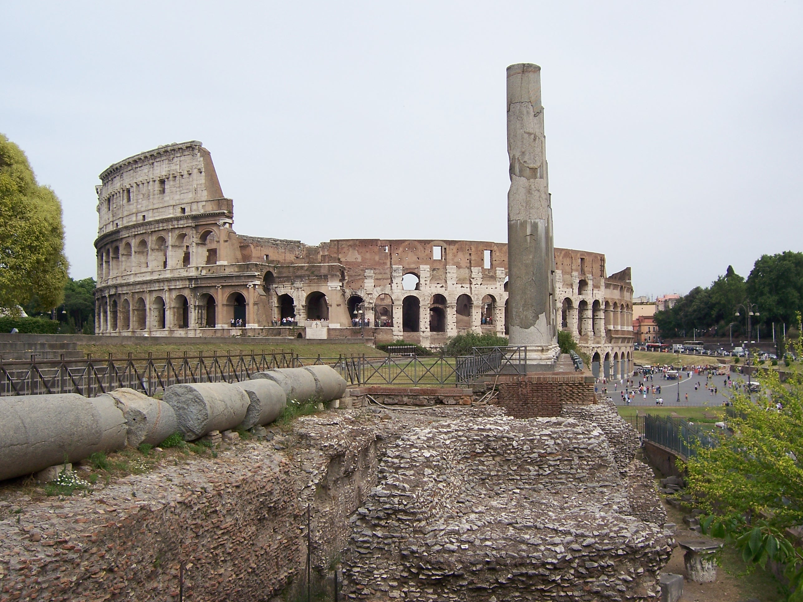 Roma, Italia